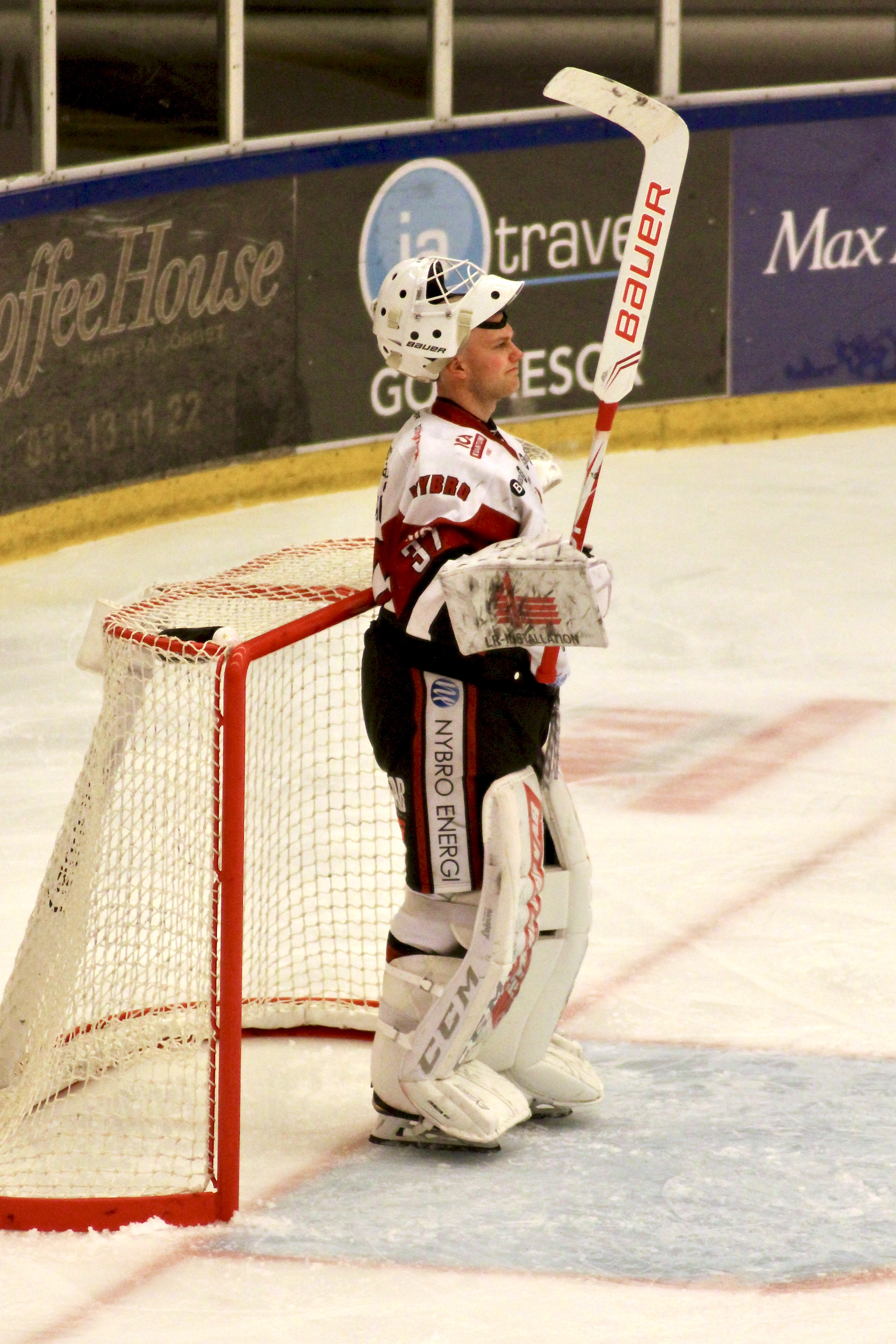 Matchdata på